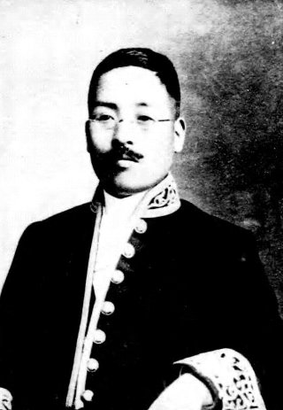 広瀬直幹（1875-1963）